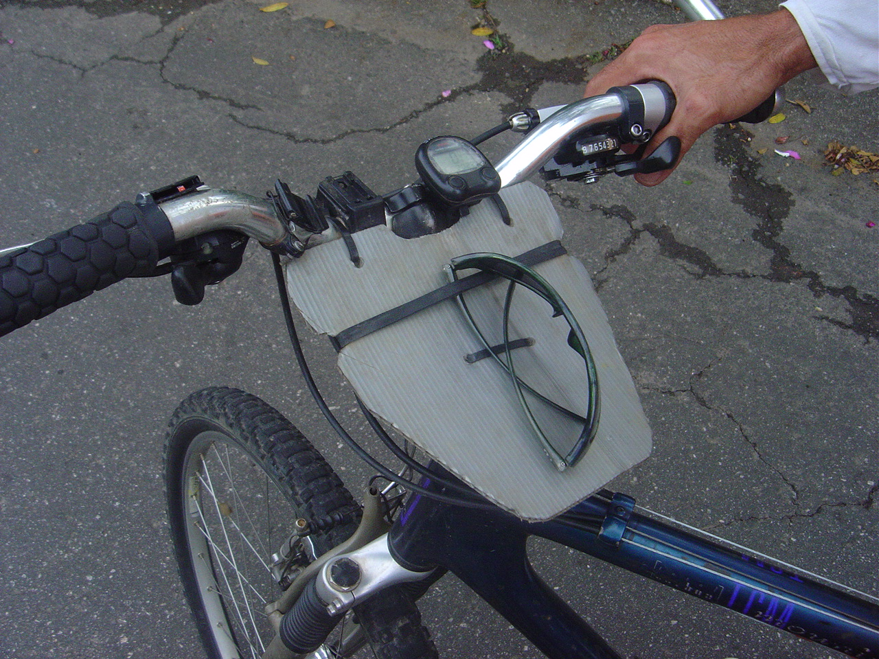 Gambiarra feita em bicicleta: prancheta para planilha de trilha e porta-objetos. Fonte: Rodrigo Boufleur Riacho Grande,SP, Novembro de 2004 A "gambiarra" (improvised solution) made in a bicycle to carry objects. Foto: Rodrigo Boufleur, São Paulo, Brazil, November 2004